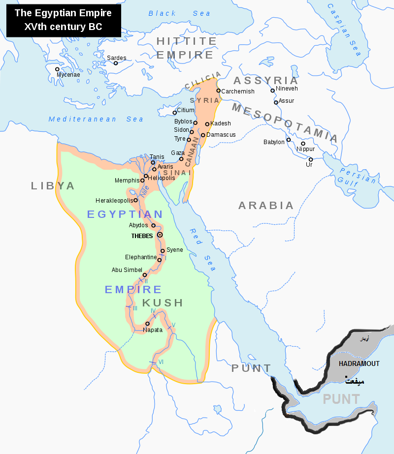 ورد في نقش بالرمو يعود لزمن الفرعون ساحورع ارسال بعثه الى بلاد بونت التي تقع جنوب بلادة واحضرو منتجات من تلك البلاد مثل البخور والذهب والابونس وهذة منتجات تزرع حصرا في مناطق حضرموت والمهرة في اليمن وظفار في جنوب عمان وبعض مناطق الصومال وهذة الخارطة توضح مناطق تلك المملكة بونت او البلاد وتعني بونت بلغه اهل ظفار اي البلاد المخيفة او المرعبه وهذا مايتماشا مع روايات والاساطير التي تتحدث عن مناطق زراعه البخور واللبان وايضا للزراف وهو حيوان افريقي فلذالك من المؤكد ان تلك الدولة تحكم اجزاء من القرن الافريقي بالاضافة لارض البخور ظفار وشرق اليمن وكانت هذة الدولة تتواجد منذ زمن ساحورع في سنه 2480 ق.م الى زمن اخر ورود لتلك الرحلات التجارية بين الفراعنه وبونت زمن الفرعون رمسيس الثالث سنه 1180 ق.م تقريبا ومابين الزمنين عدة رحلات واحداث مابين الفراعنة وبلاد بونت التي تنتج البخور المقدس لدى الفراعنة قديما